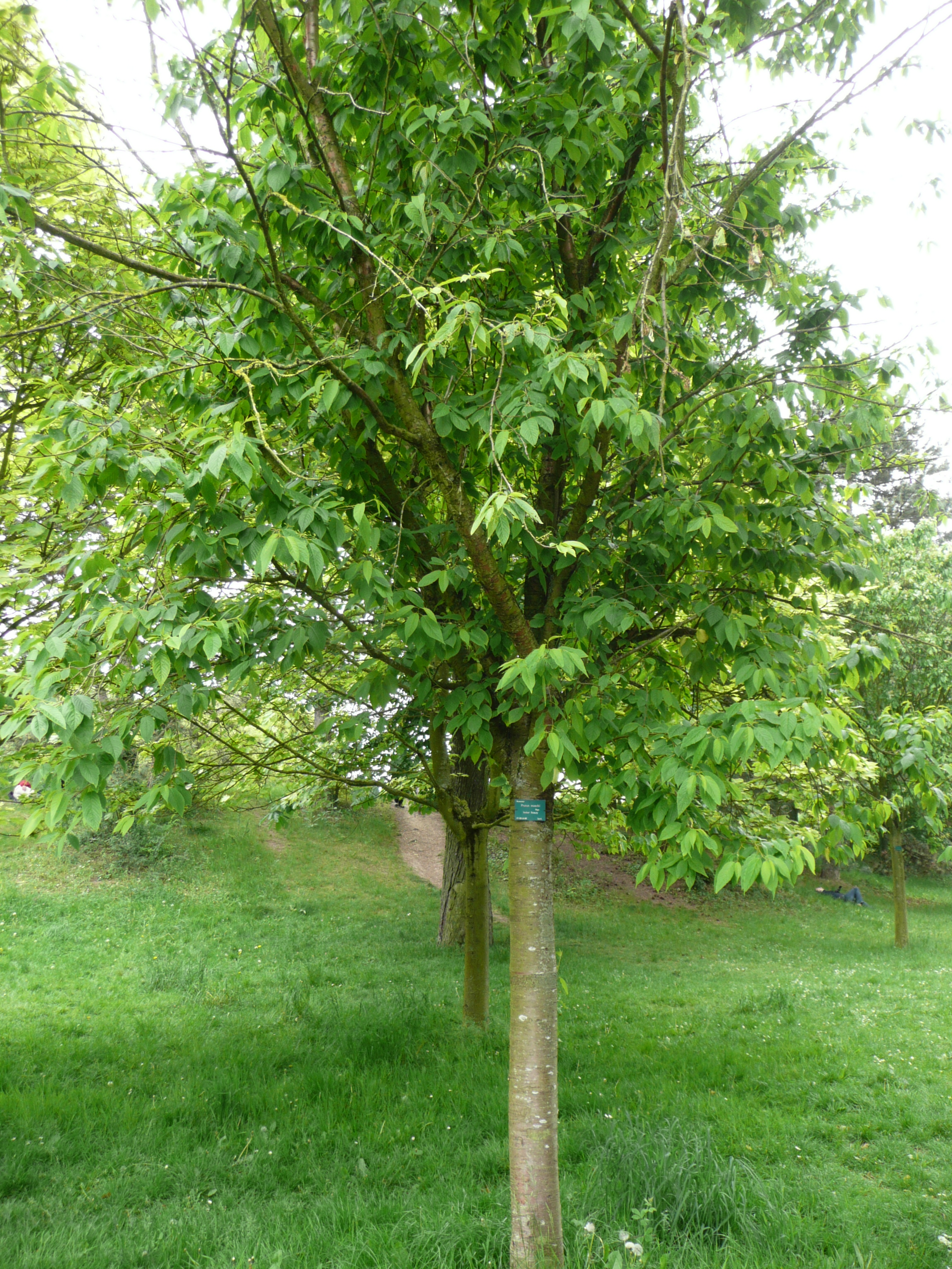 Prunus maackii in Parc floral de Paris Map: 48° 50' 19" N 2° 26' 33" E